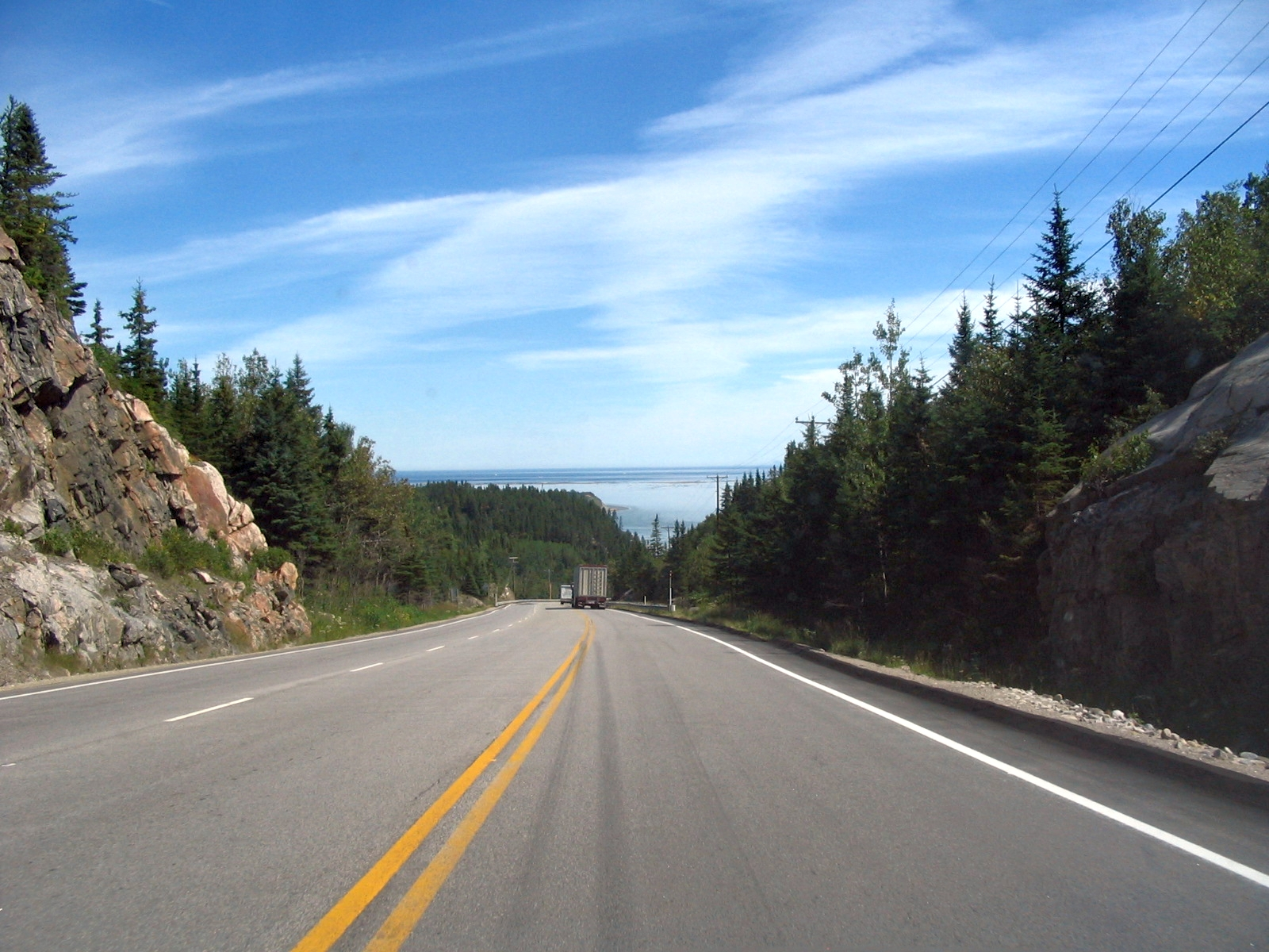 La route québécoise 138 possède un parcours très abrupt par endroits dans la région de Charlevoix, en bordure du fleuve Saint-Laurent.